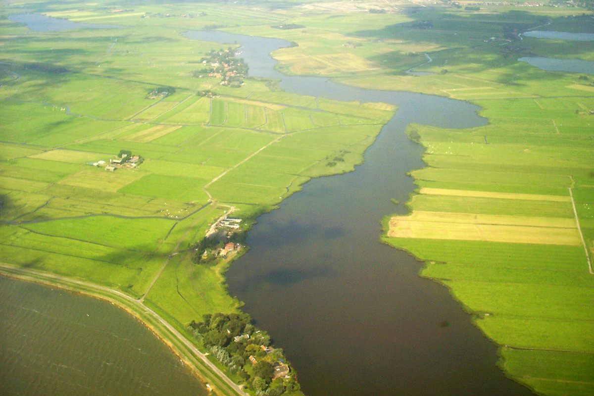 Holysloot and Holysloter Die, Netherlands